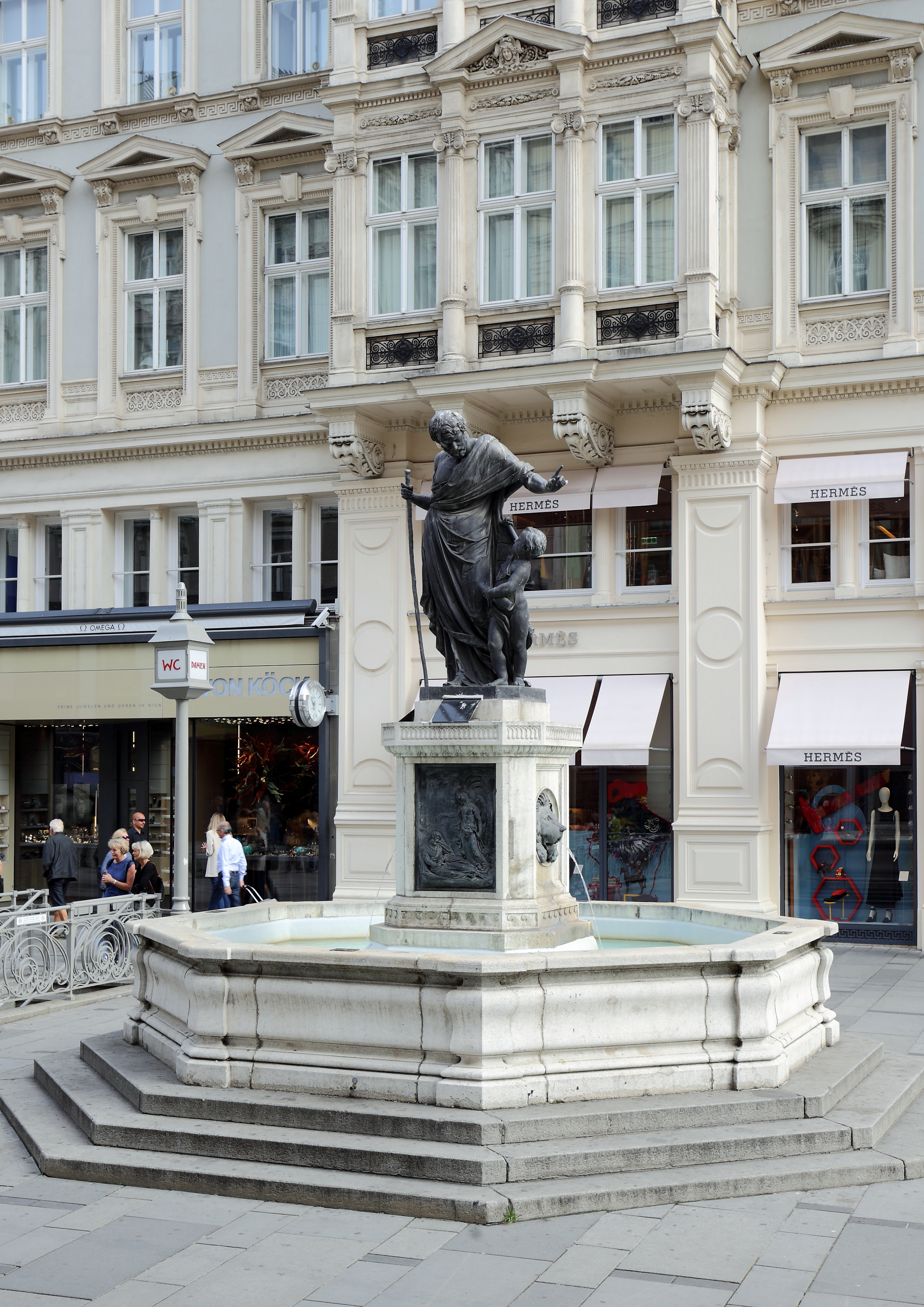 Der Josefbrunnen westseitig der Pestsäule am Graben im 1. Wiener Gemeindebezirk Innere Stadt.Ursprünglich anstelle eines alten Brunnens 1680/81 errichtet. Um 1730/40 wurde der Brunnen wesentlich verändert. Seine heutige Form erhielt er im Jahr 1804, wo unter anderem die ursprüngliche Heiligenskulptur durch eine Bleifigur des Bilderhauser Johann Martin Fischer ersetzt wurde.